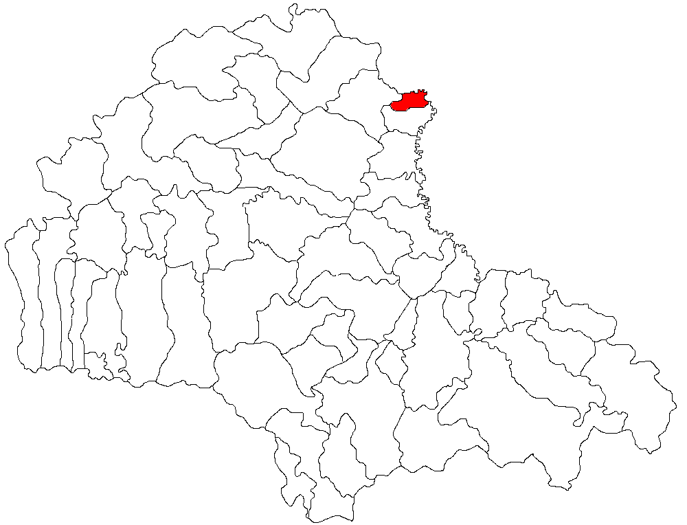 Localizarea comunei Augustin in judetul Brasov Licensing Categorie:Hărţi ale judeţului Braşov